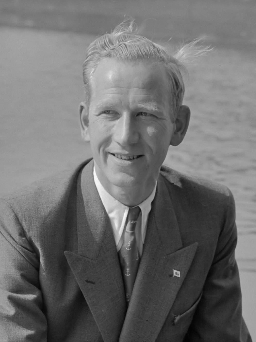 Wim de Vries Lentsch (kop) 10 april 1952